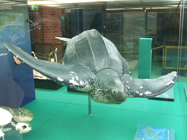 Riesenschildkröte im Stralsunder Meeresmsueum